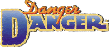 Logo del gruppo musicale Danger Danger.